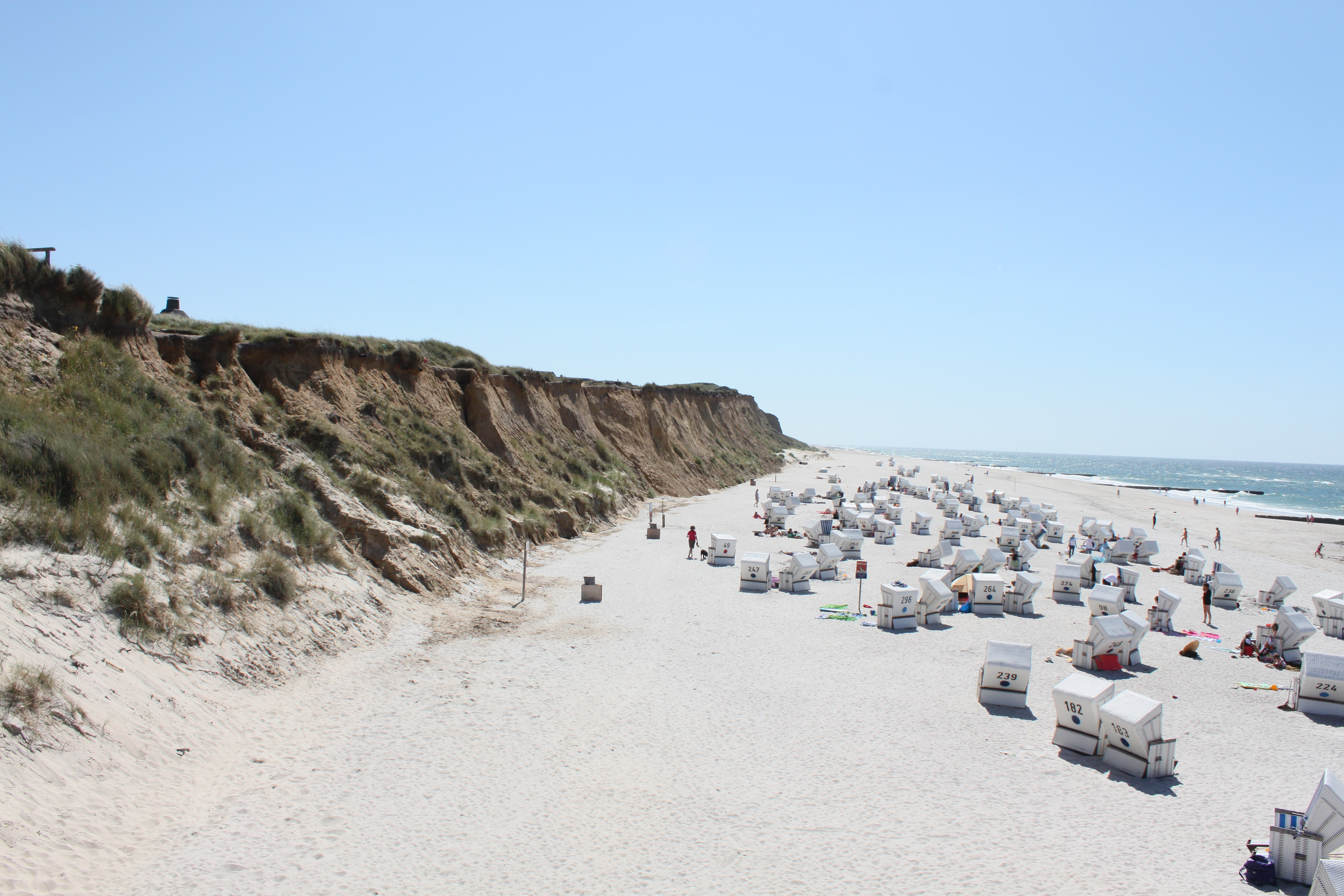 Kampen auf Sylt, Strand, Rotes Kliff